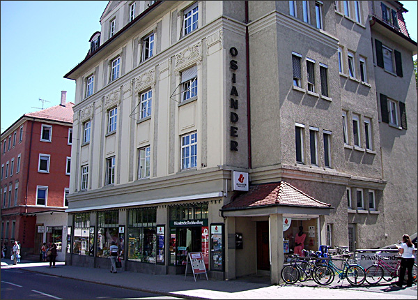 Das Stammhaus der Osianderschen Buchhandlung in der Tübinger Wilhelmstraße